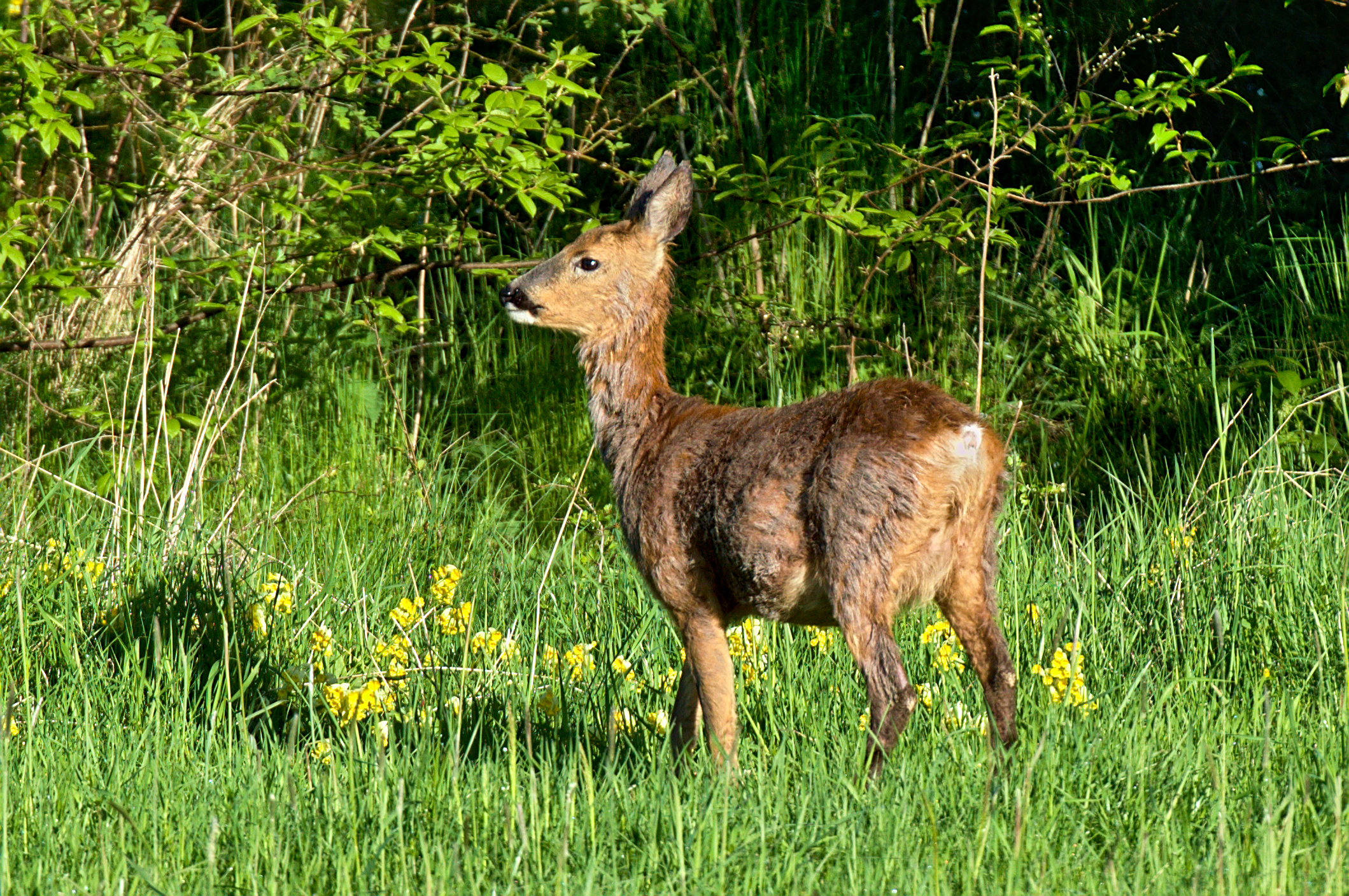 Rådjur (Capreolus capreolus) på Ornö, i närheten av skolan.